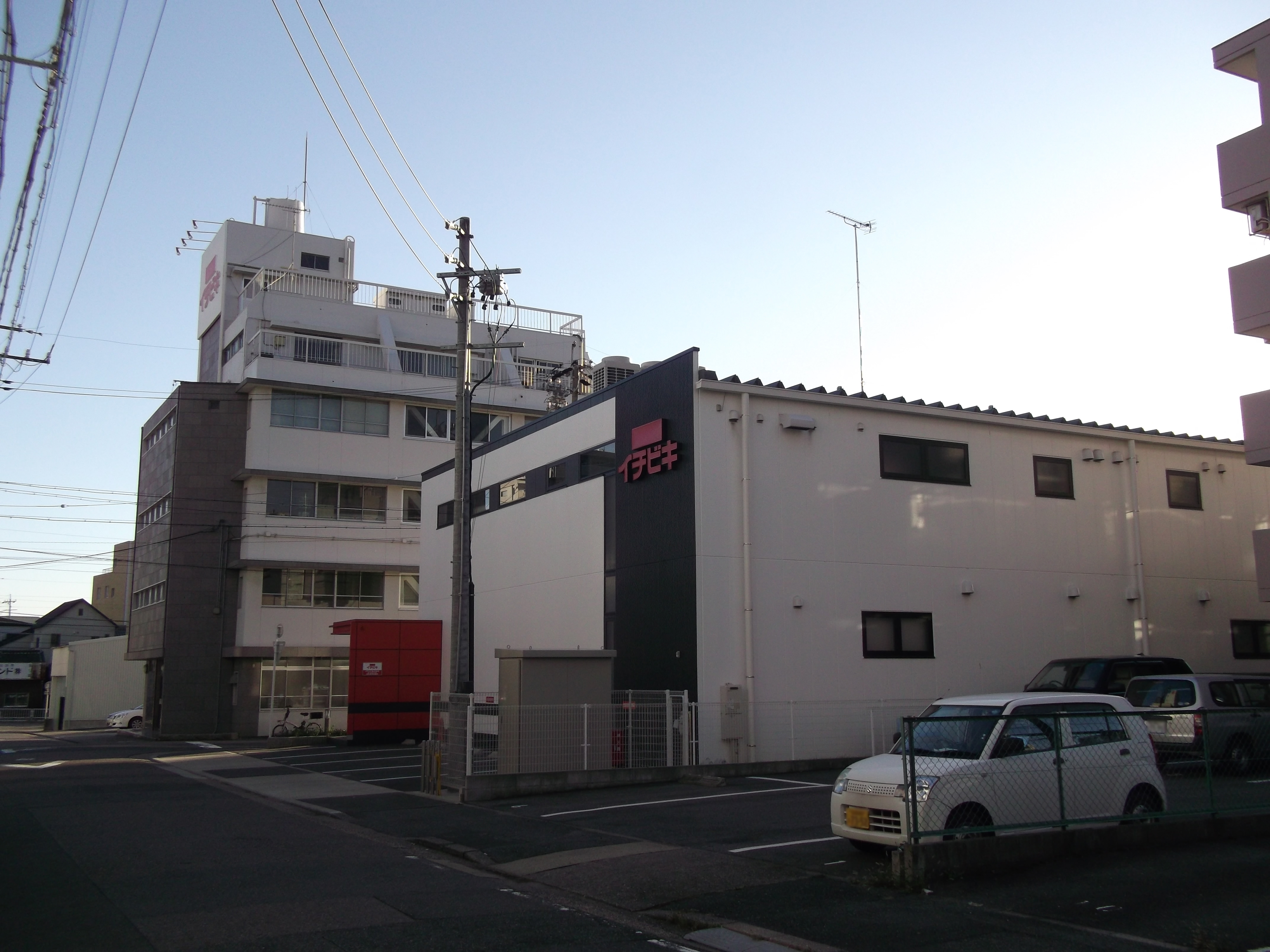 名古屋市熱田区新尾頭一丁目のイチビキ本社を東側公道北側より撮影。ただし、ナンバープレートにつき画像処理済。